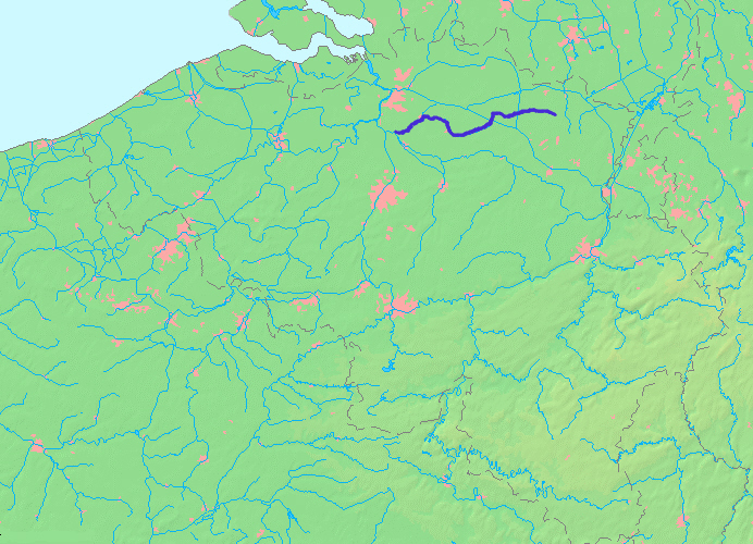 Kaart Grote Nete op basis van Wikimedia Commons kaart MapBelgiumWater